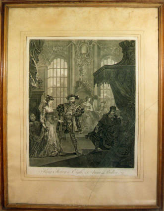 Gravat on apareix una escena de cort amb Enric VIII i Anna Bolena, de William Hogarth